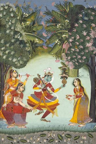 कोटा शैली में निर्मित रागमाला का एक चित्र "वसंत रागिनी"। इसमें कृष्ण को गोपियों के साथ वसंतोत्सव मनाते हुए दिखाया गया है। Vasant Ragini Krishna Dancing with Three Female Musicians Kota, Rajasthan,India circa 1770 according to